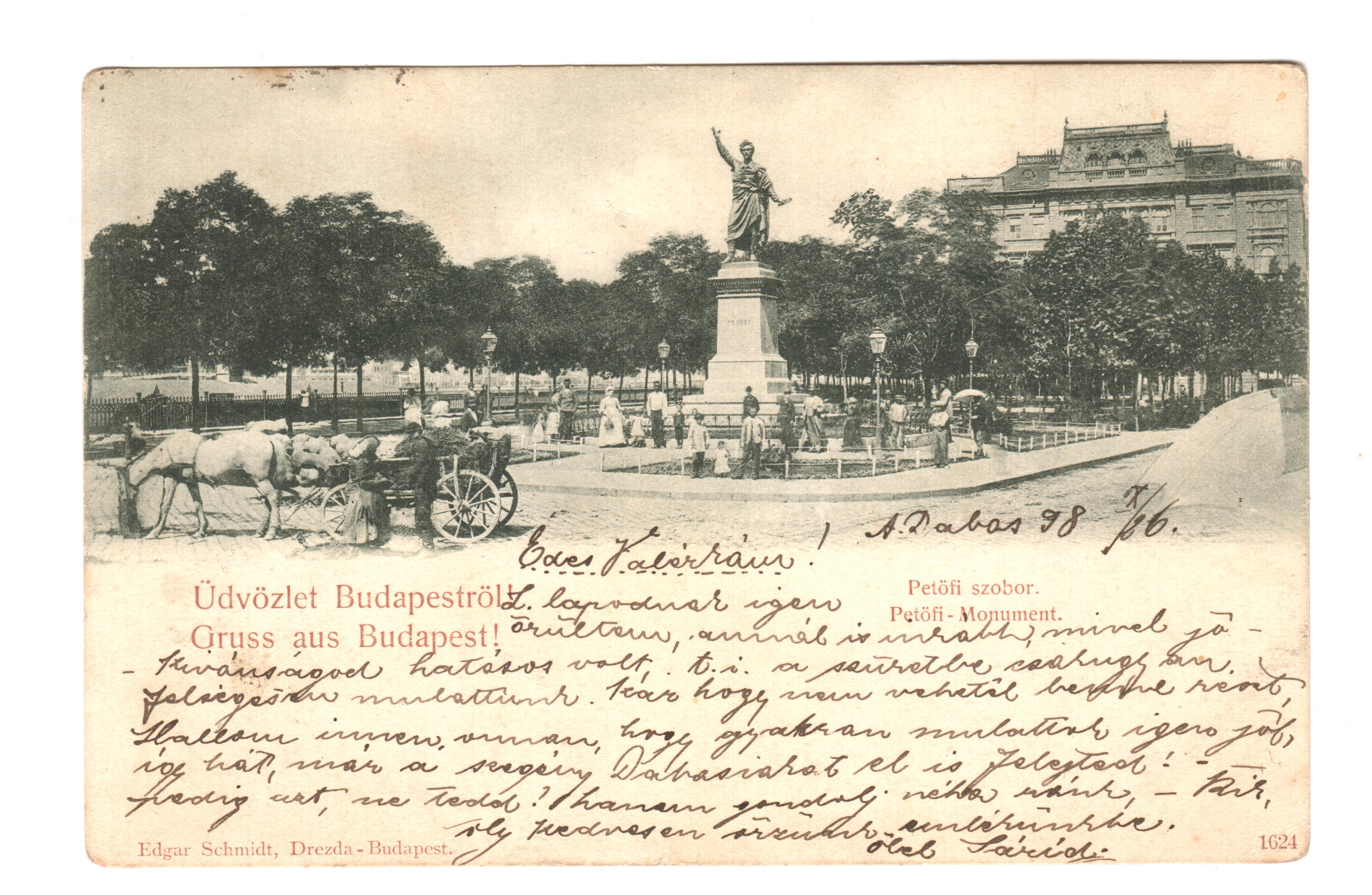 Petőfi Sándor szobra, Budapest V. (Huszár Adolf alkotása, 1882)